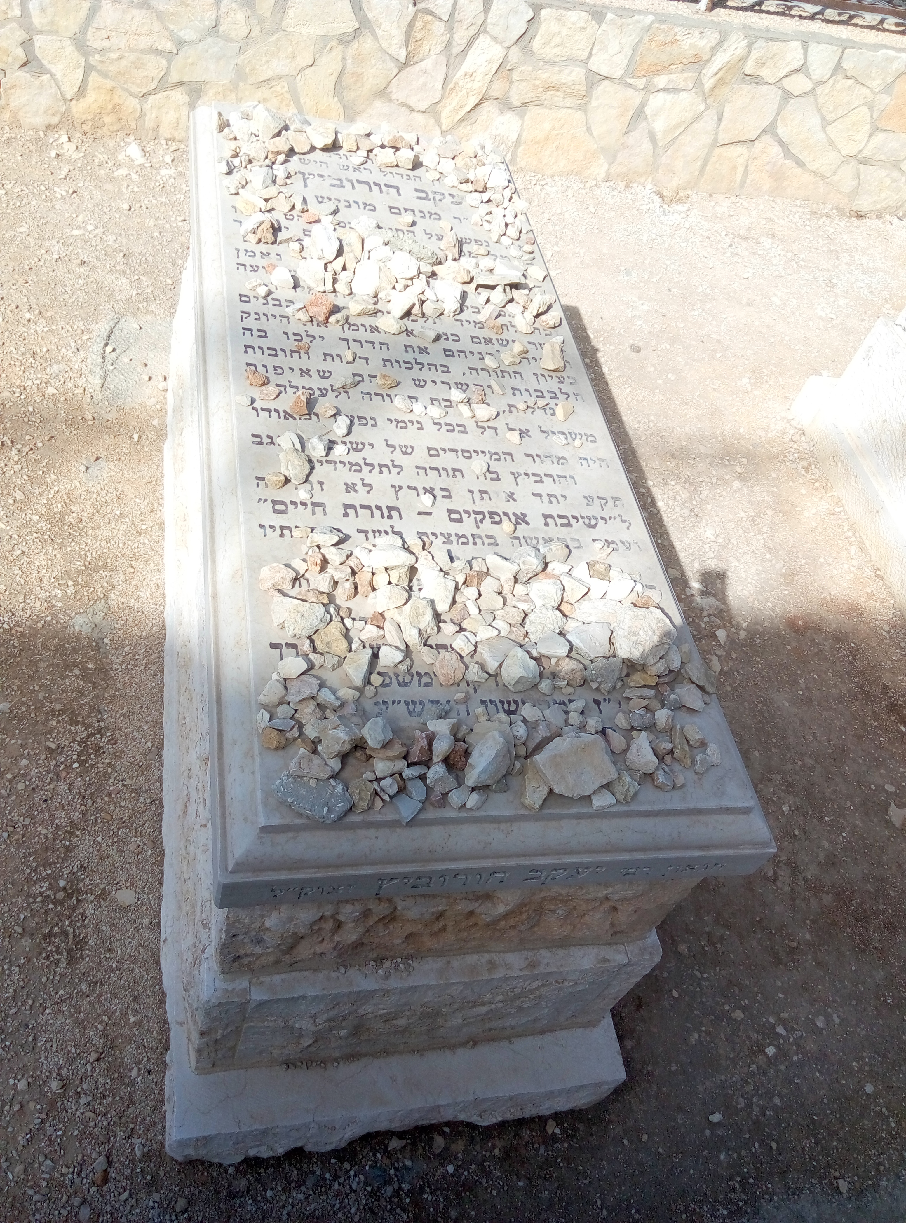 מקום הציון